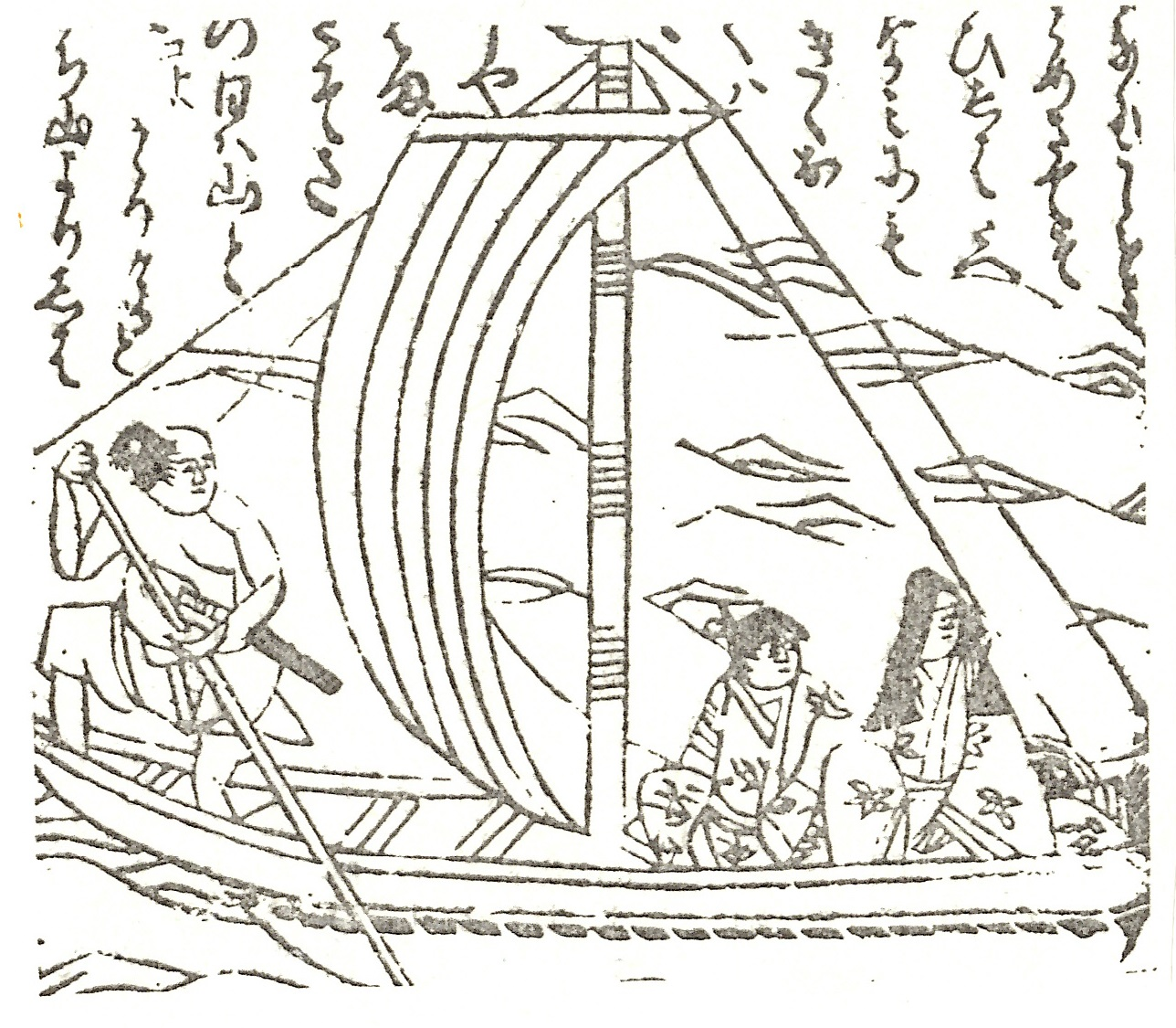 天下一説経与七郎正本『さんせう太夫』（寛永16年（1639年）頃刊行）